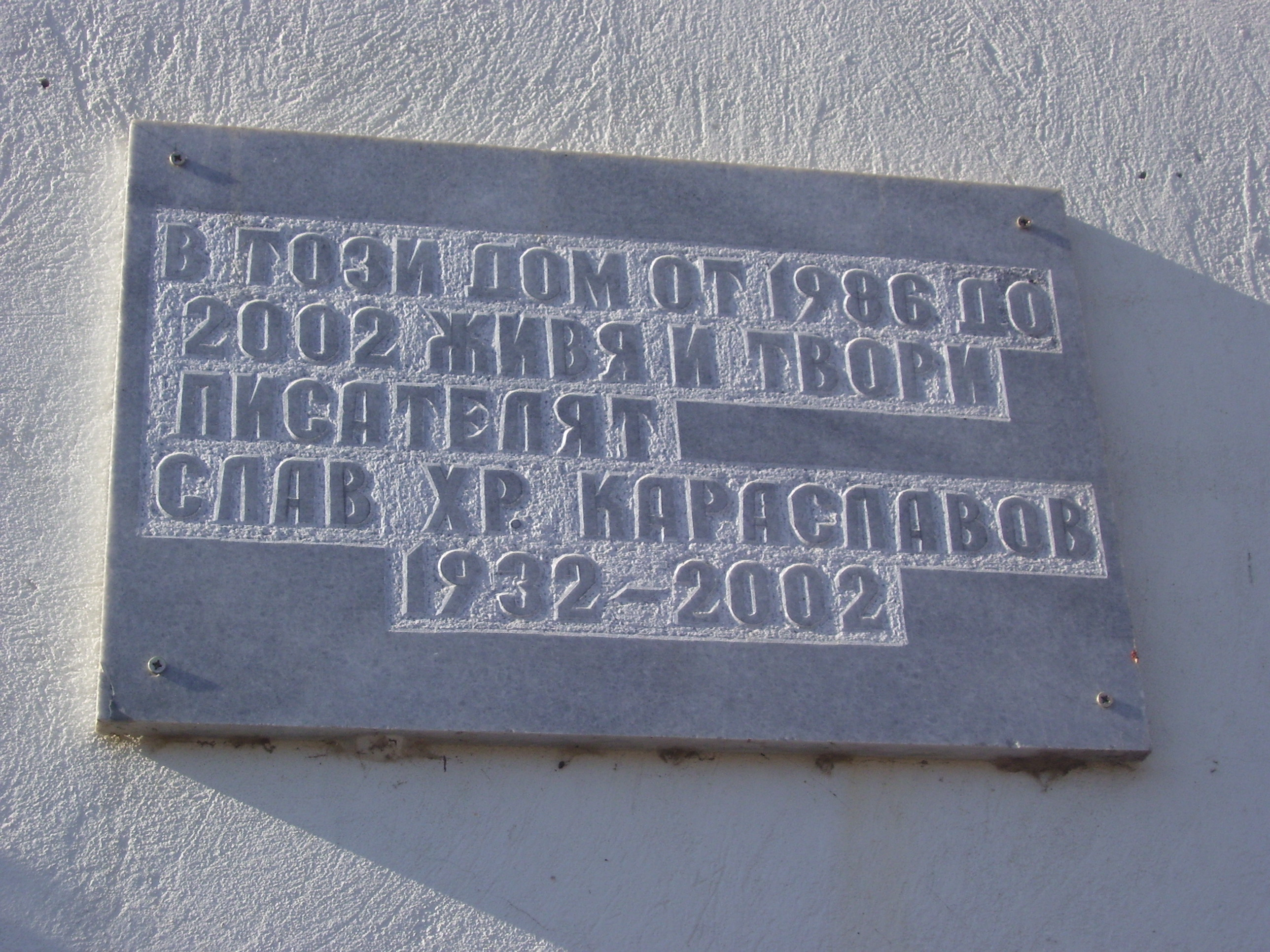 Паметна плоча на къщата на писателя Слав Христов Караславов в село Литаково, България.